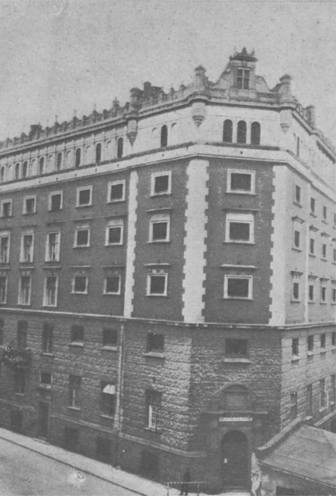 Areszt Centralny przy ul. Daniłowiczowskiej w Warszawie